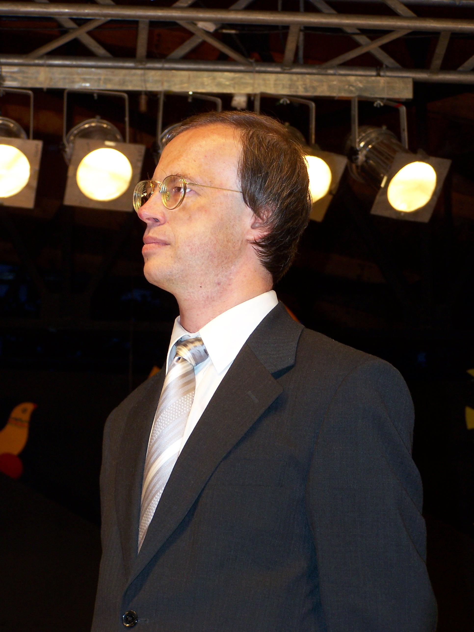 Tomasz Merta (podsekretarz stanu w Ministerstwie Kultury i Dziedzictwa Narodowego i Generalny Konserwator Zabytków) podczas 43. Tygodnia Kultury Beskidzkiej w Żywcu.